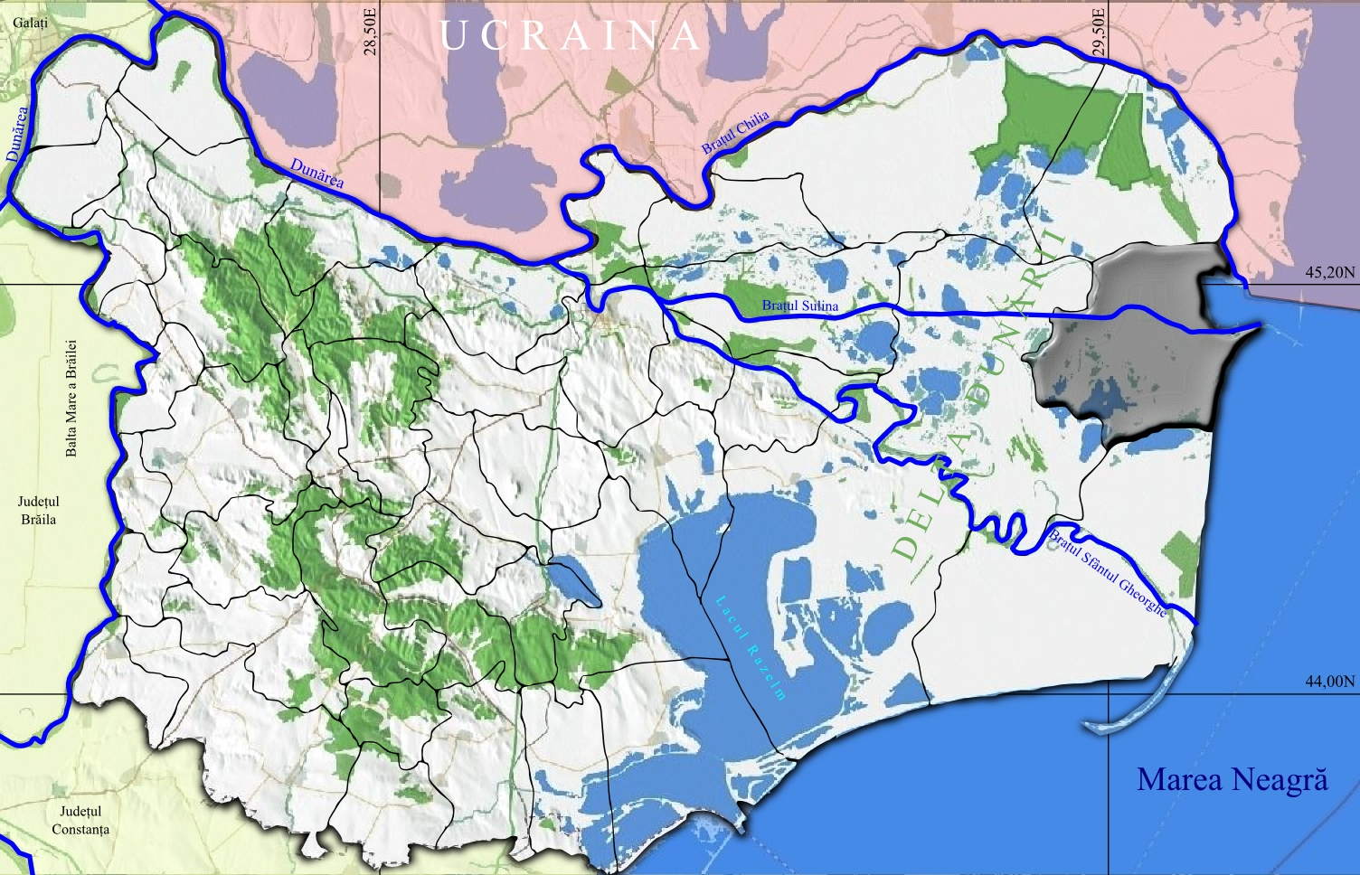 Sulina jud Tulcea.